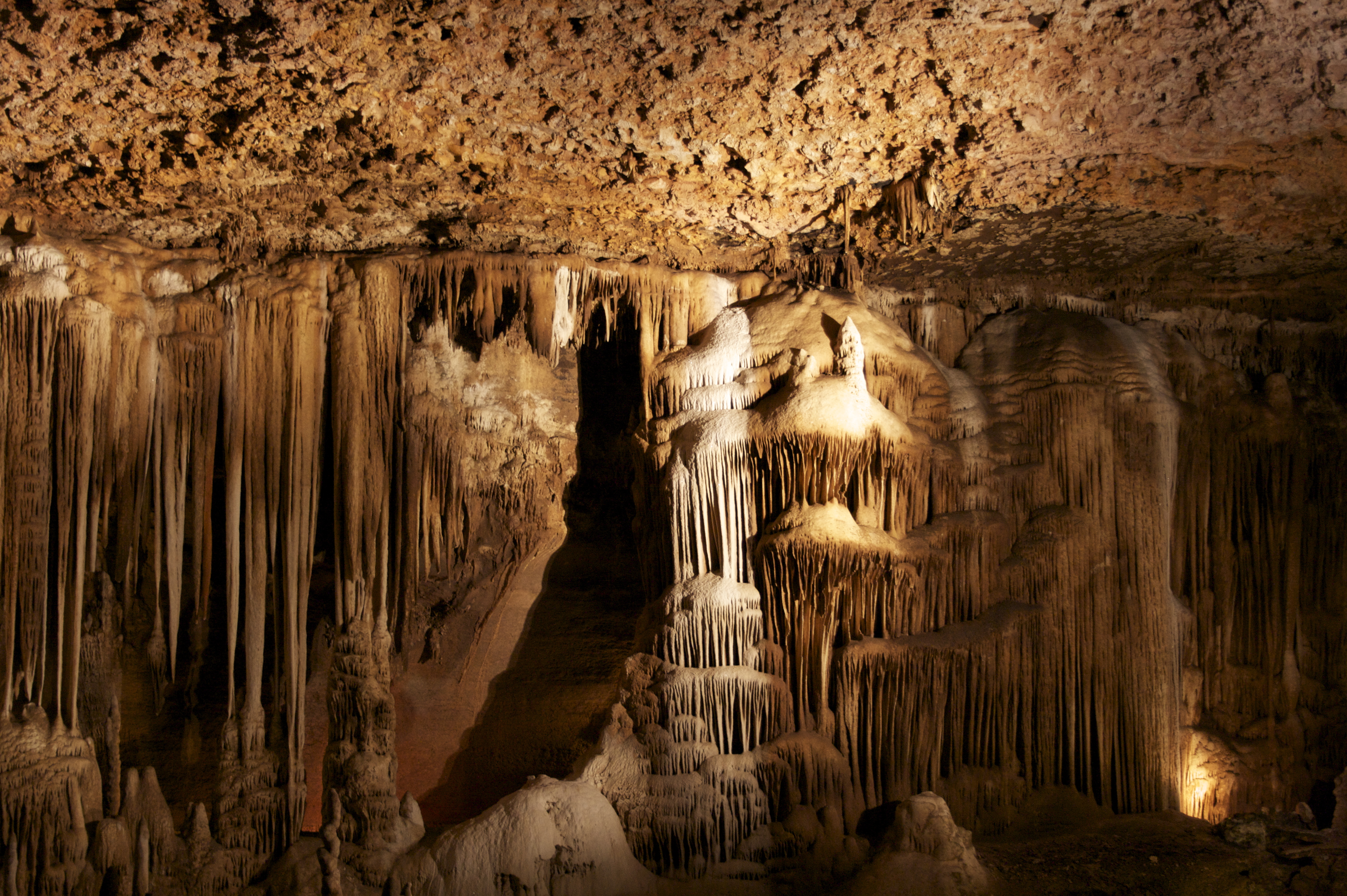 Blanchard Springs Cave, Arkansas.